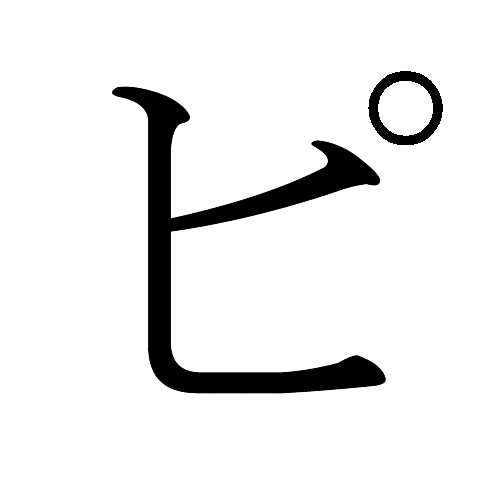 Japanese Katakana "Pi"